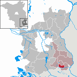 Tschernitz in Brandenburg (Country) - District Spree-Neiße